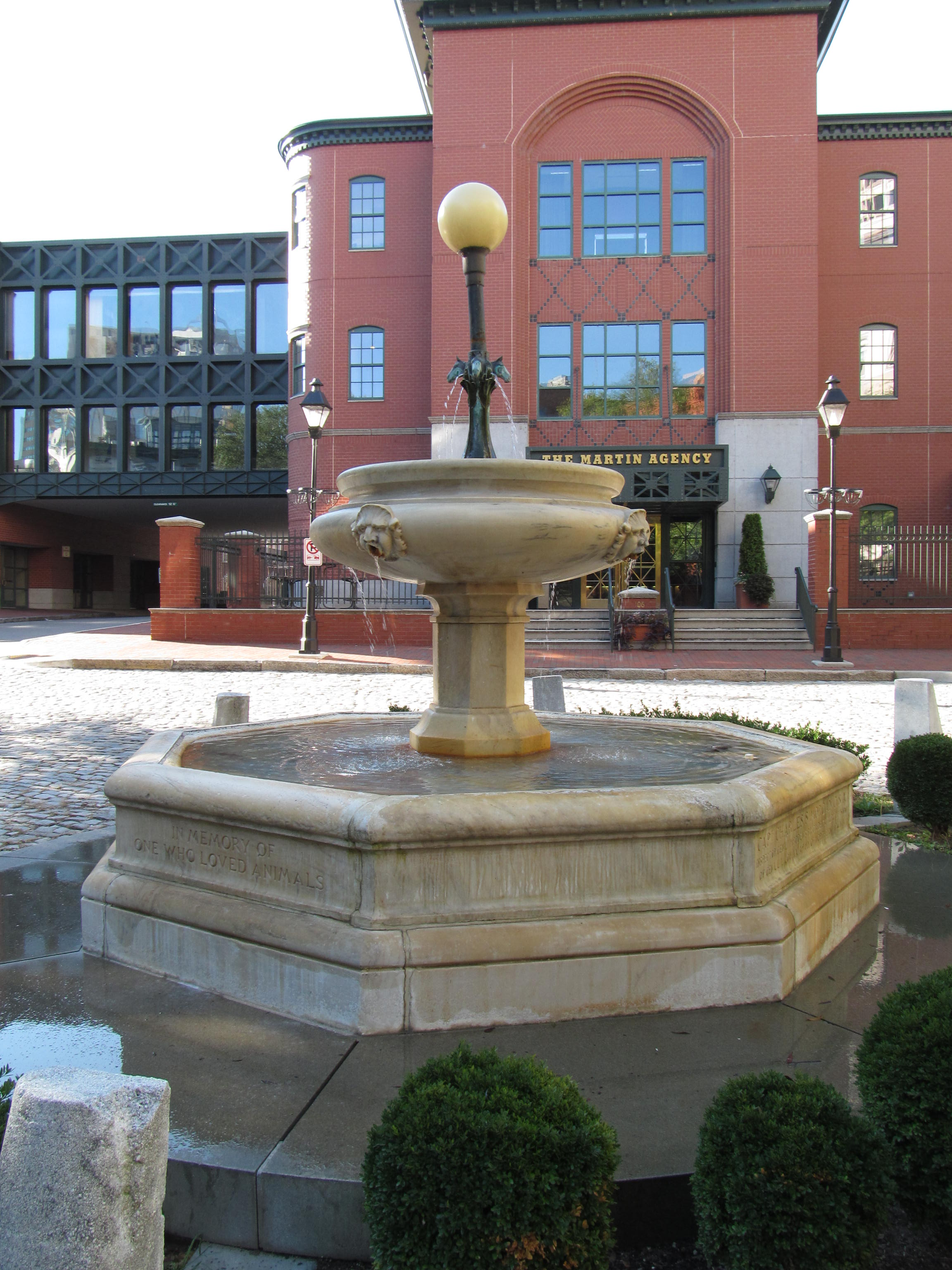 Richmond, Virginia